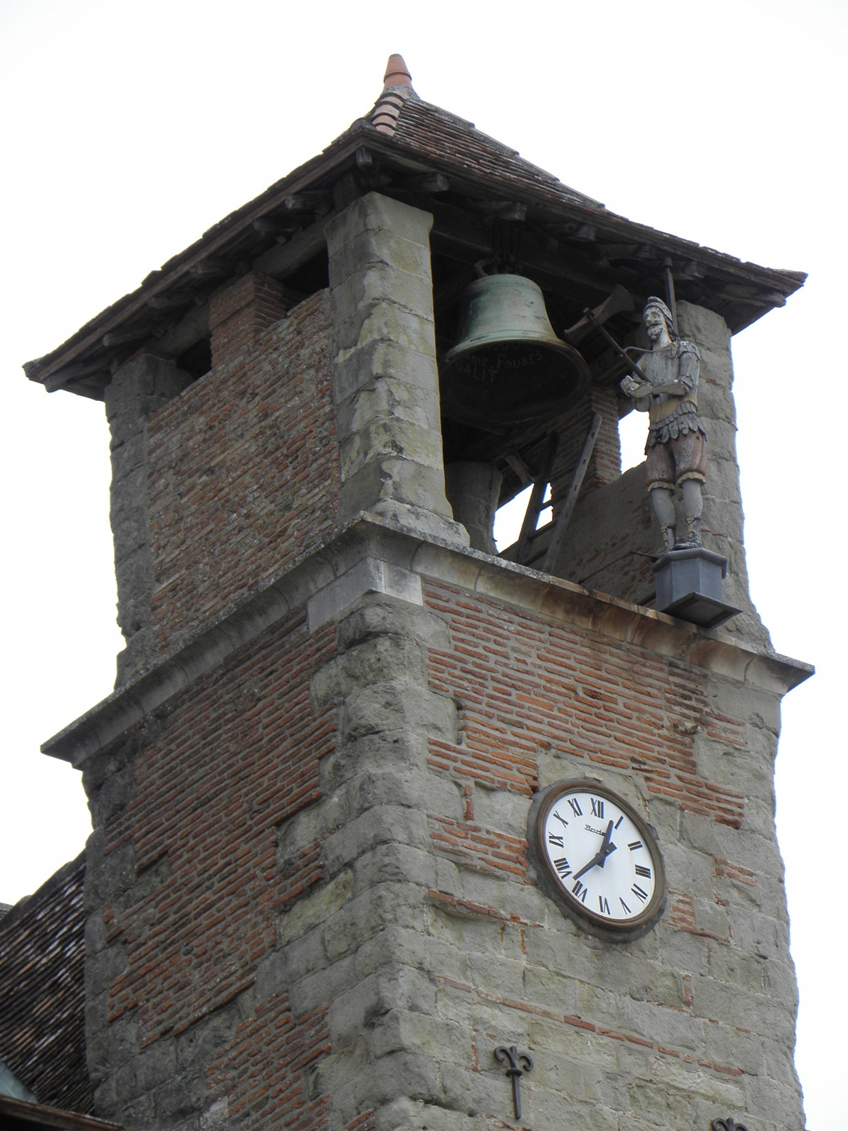 Jacquemart de la cathédrale Saint-Alain de Lavaur (81). .